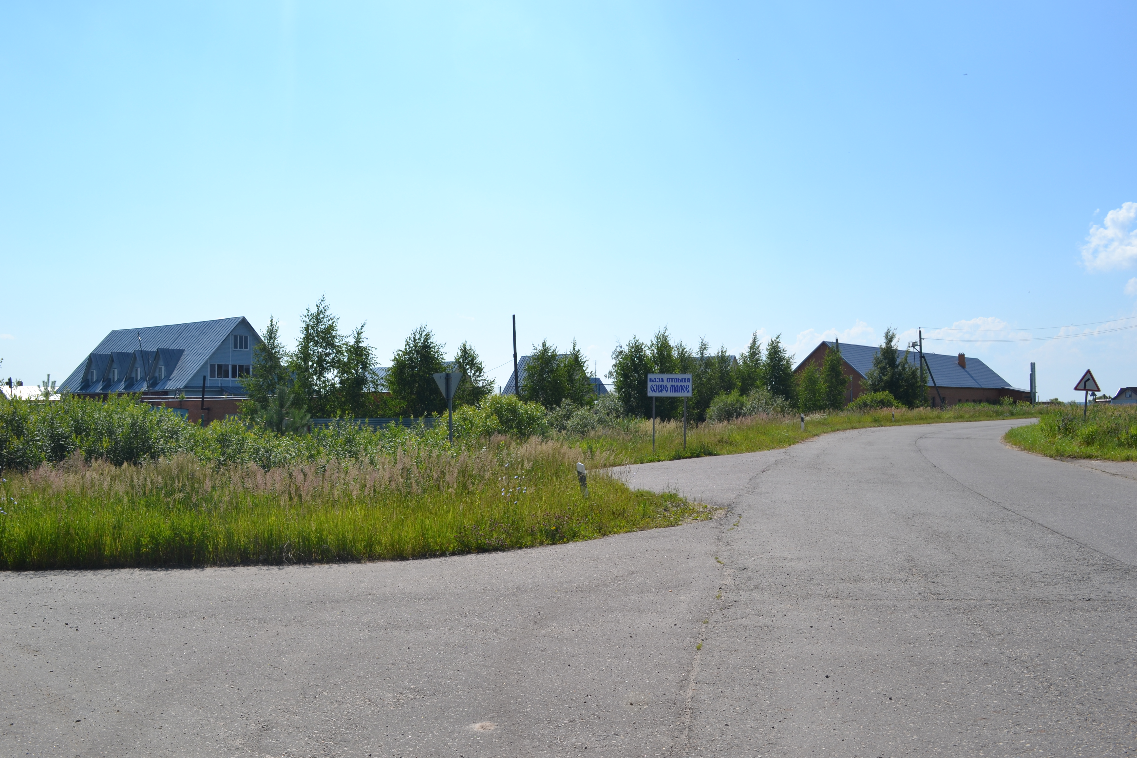 База отдыха у деревни Погостище (Шатурский район)